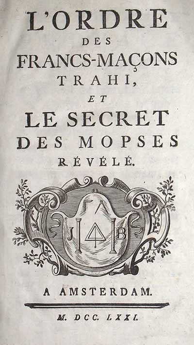 Image from: Gabriel-Louis-Calabre Pereau: L'Ordre de Francs Macons Trahi et le secret des mopses révélé. Amsterdam 1771.